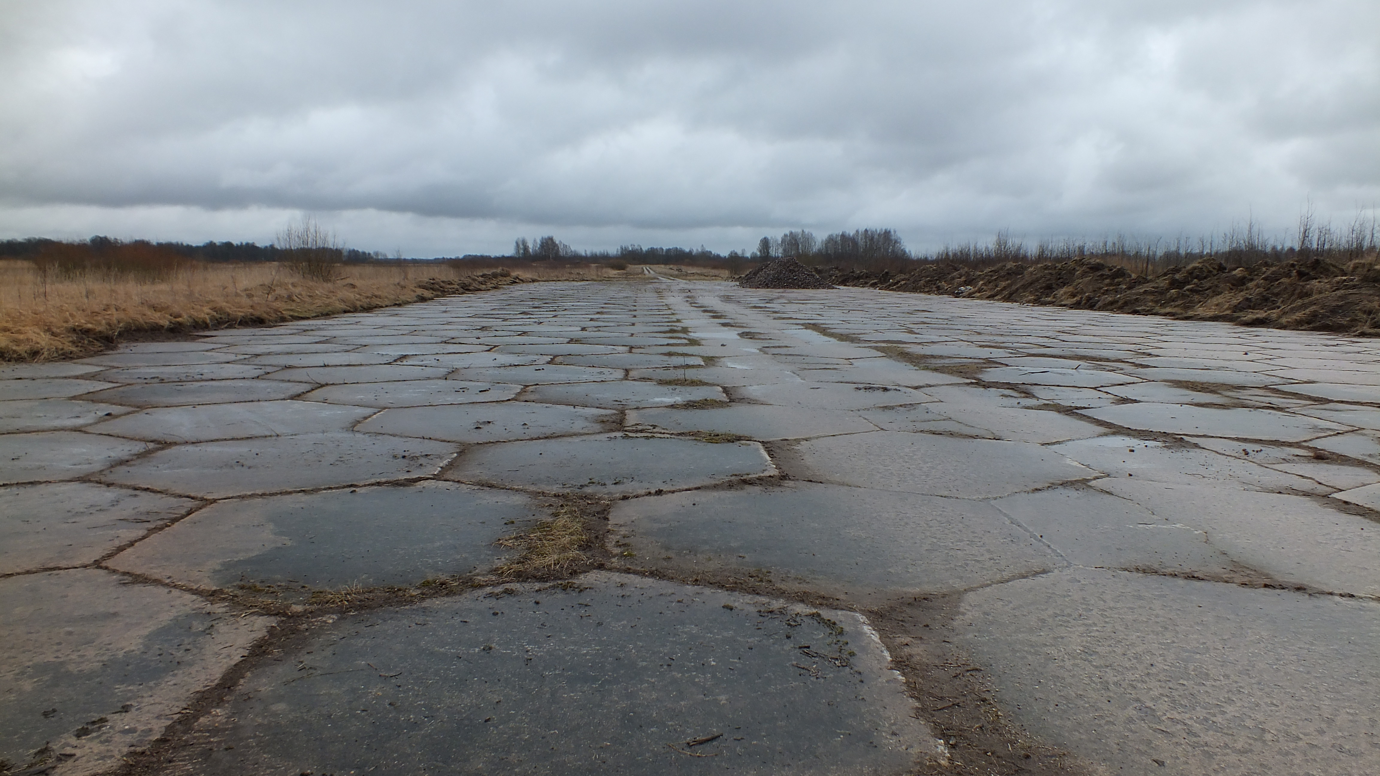 Ezeres lidlauka rietumu gals